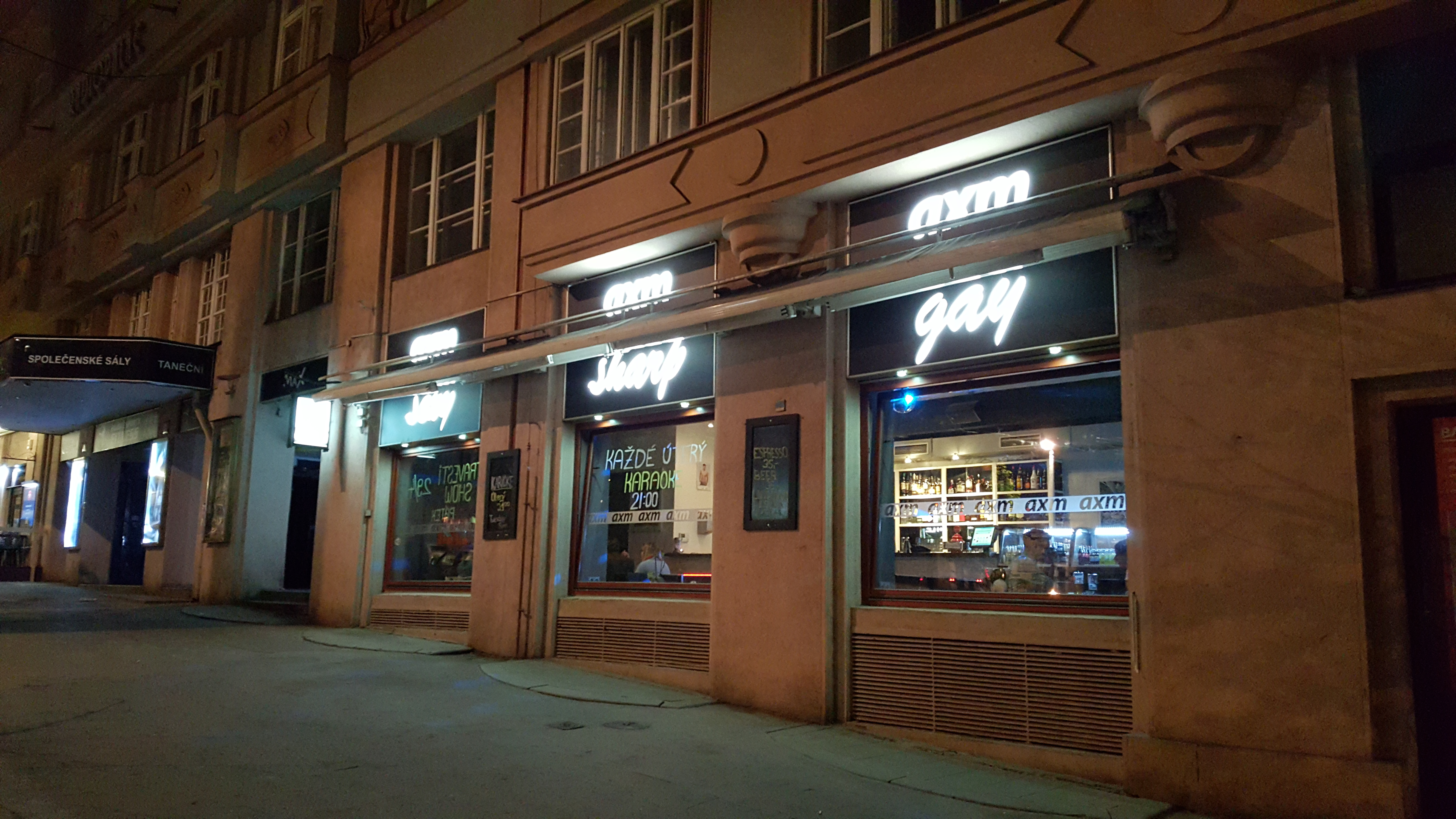 AXM, a gay bar in Prague, in 2016 (Vinohradská 1789/40)